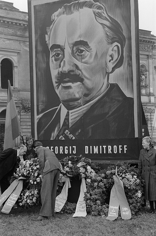 Original image description from the Deutsche FotothekEhrenwache und Kranzniederlegung vor Dimitroff-Bildnis